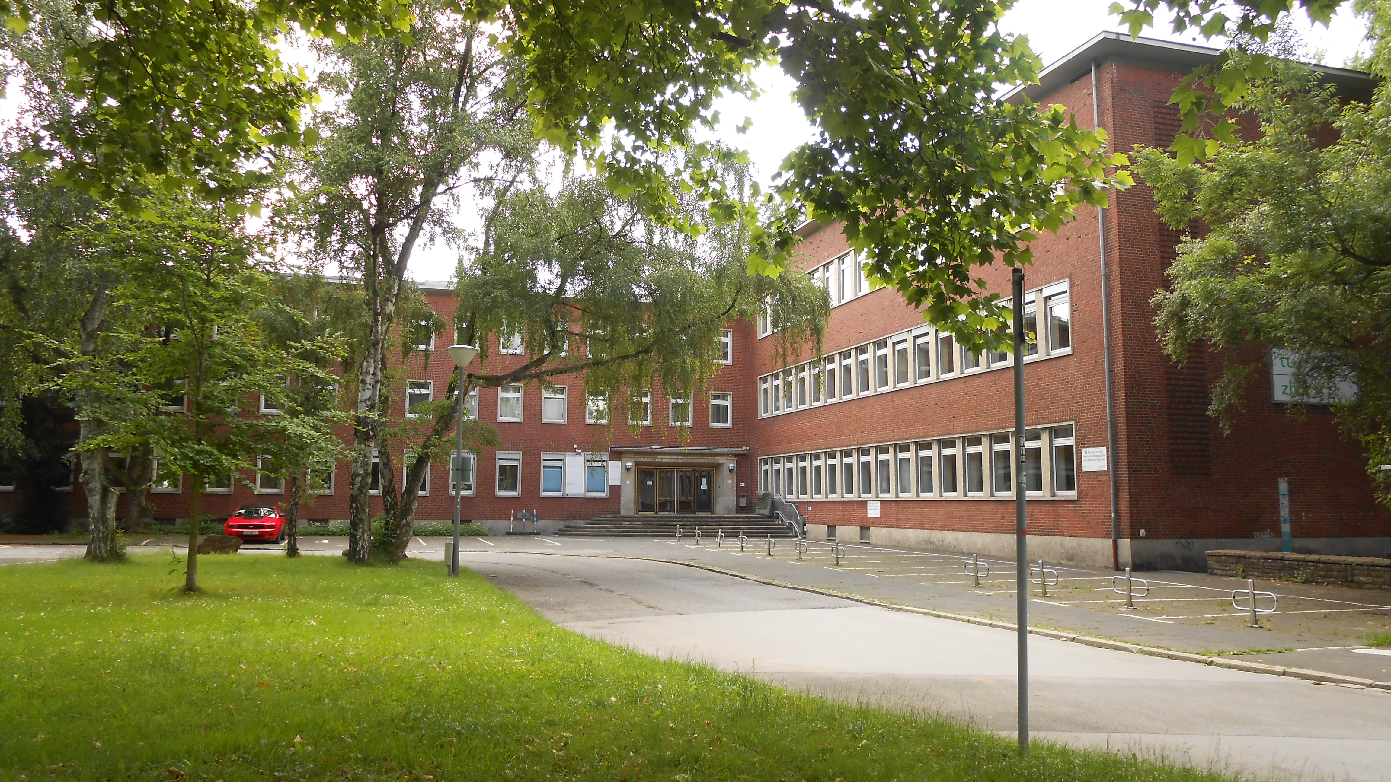 Das Gebäude an der Hohen Straße 141, früher Sitz des Max-Planck-Instituts, heute der Sozialakademie Dortmund / Zentrum für HochschulBildung der Technischen Universität Dortmund.